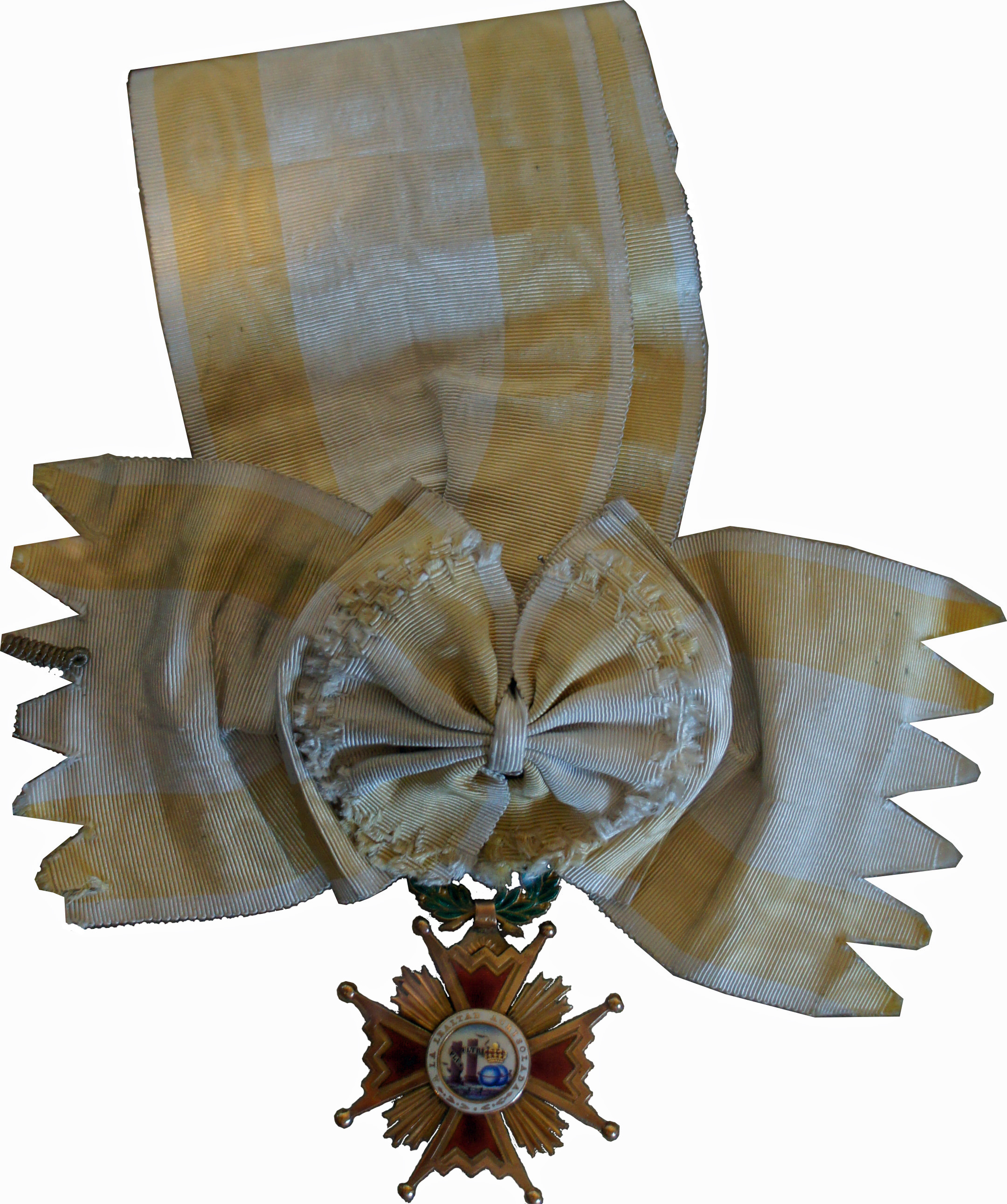 Espagne,_cordon_de_grand_officier_de_l'ordre_d'Isabelle_la_catholique ayant appartenu au général Elie de Vassoigne.